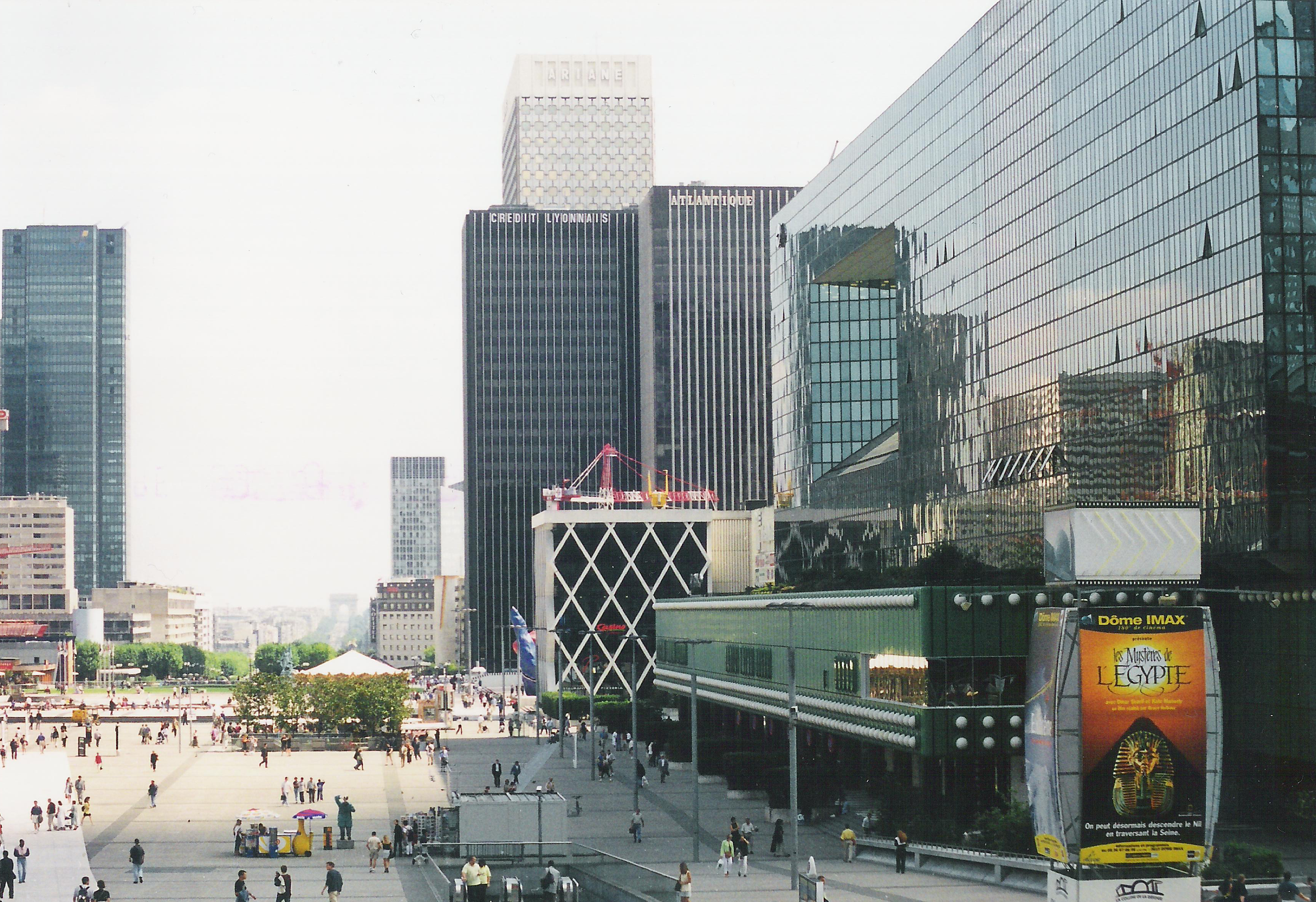 Photo de la tour Credit Lyonnais en 1999